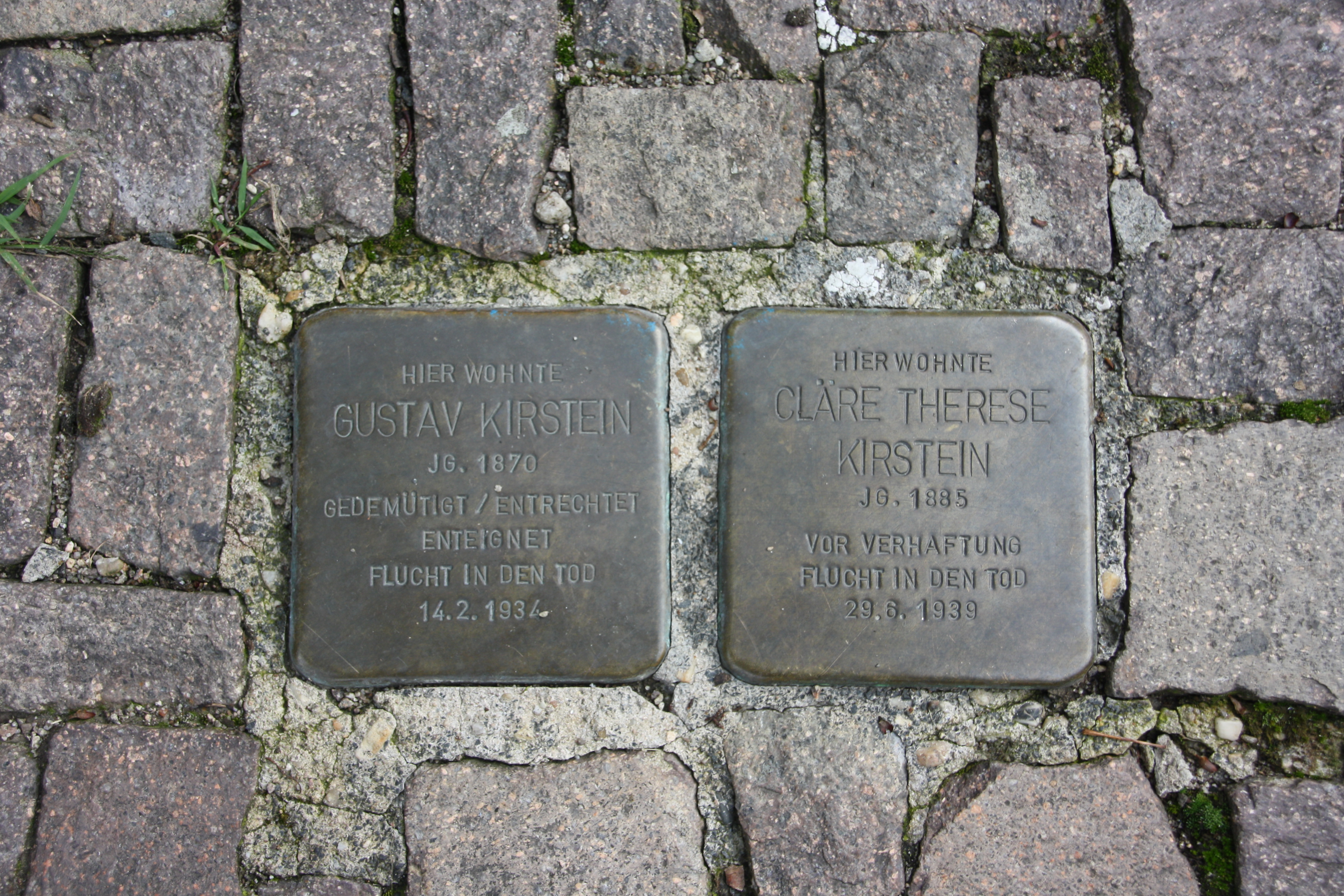 Stolpersteine für Gustav Kirstein, Cläre Therese Kirstein